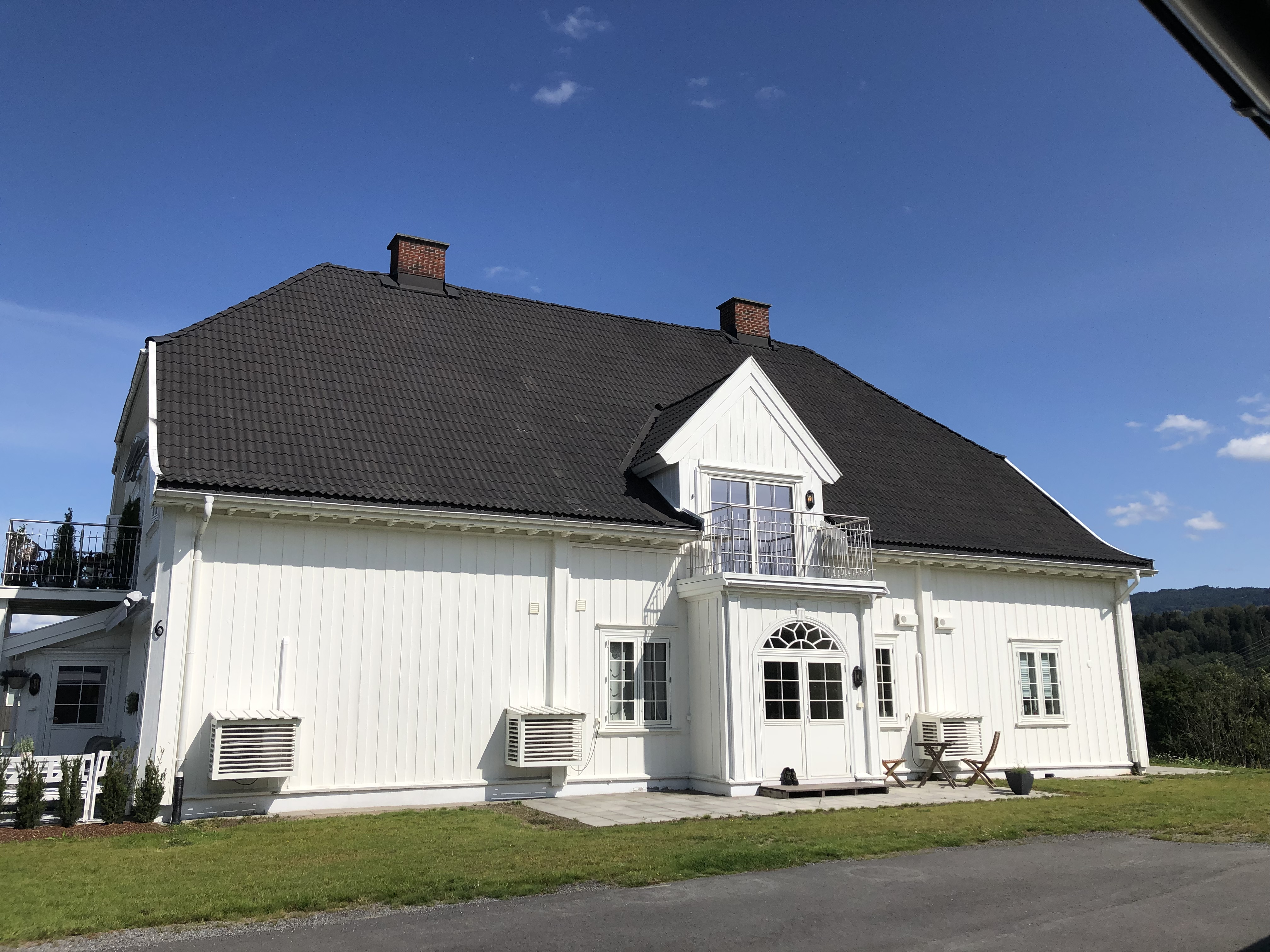 Hønen gård, Hønefoss, fasade